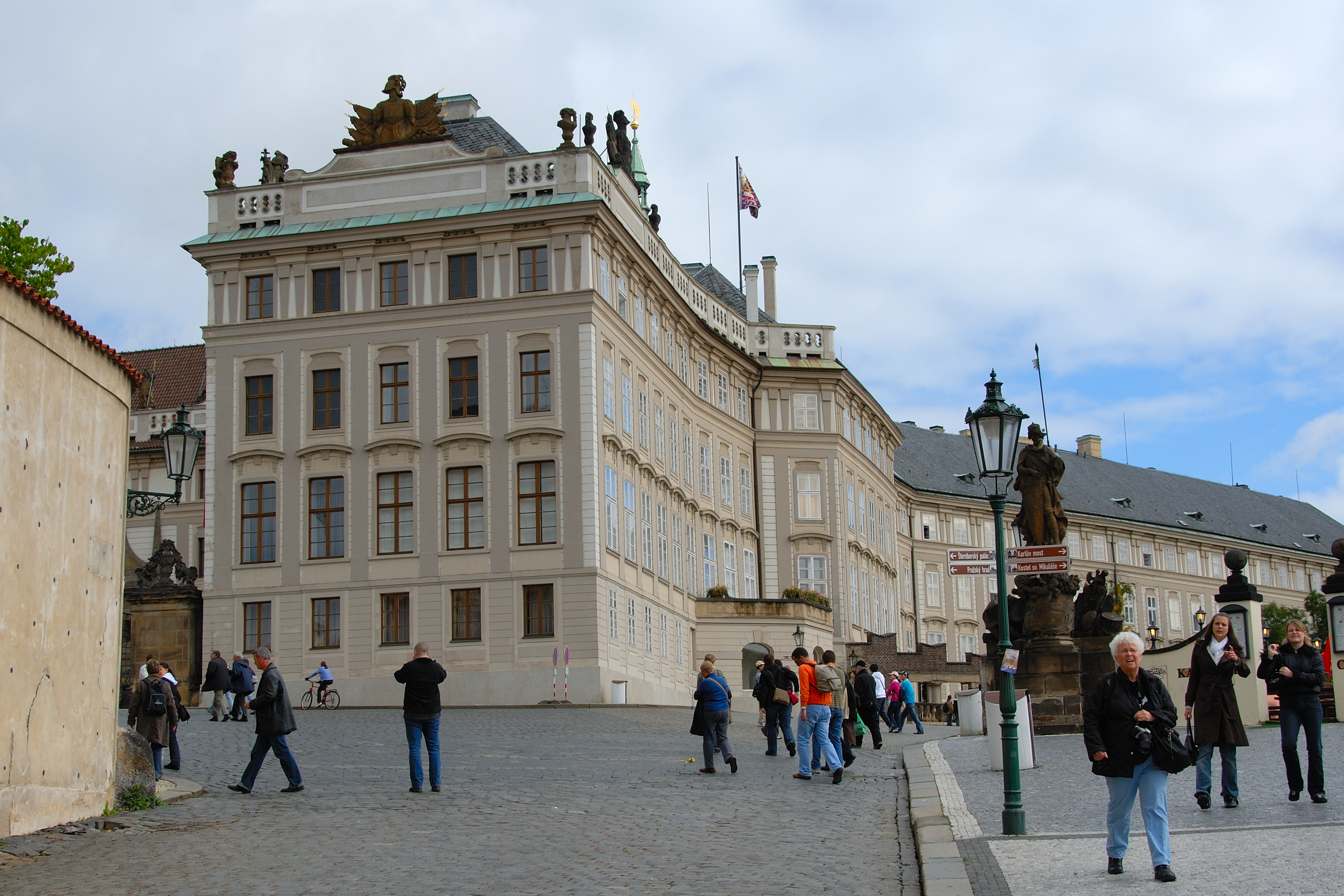 Pražský hrad, Nový královský palác